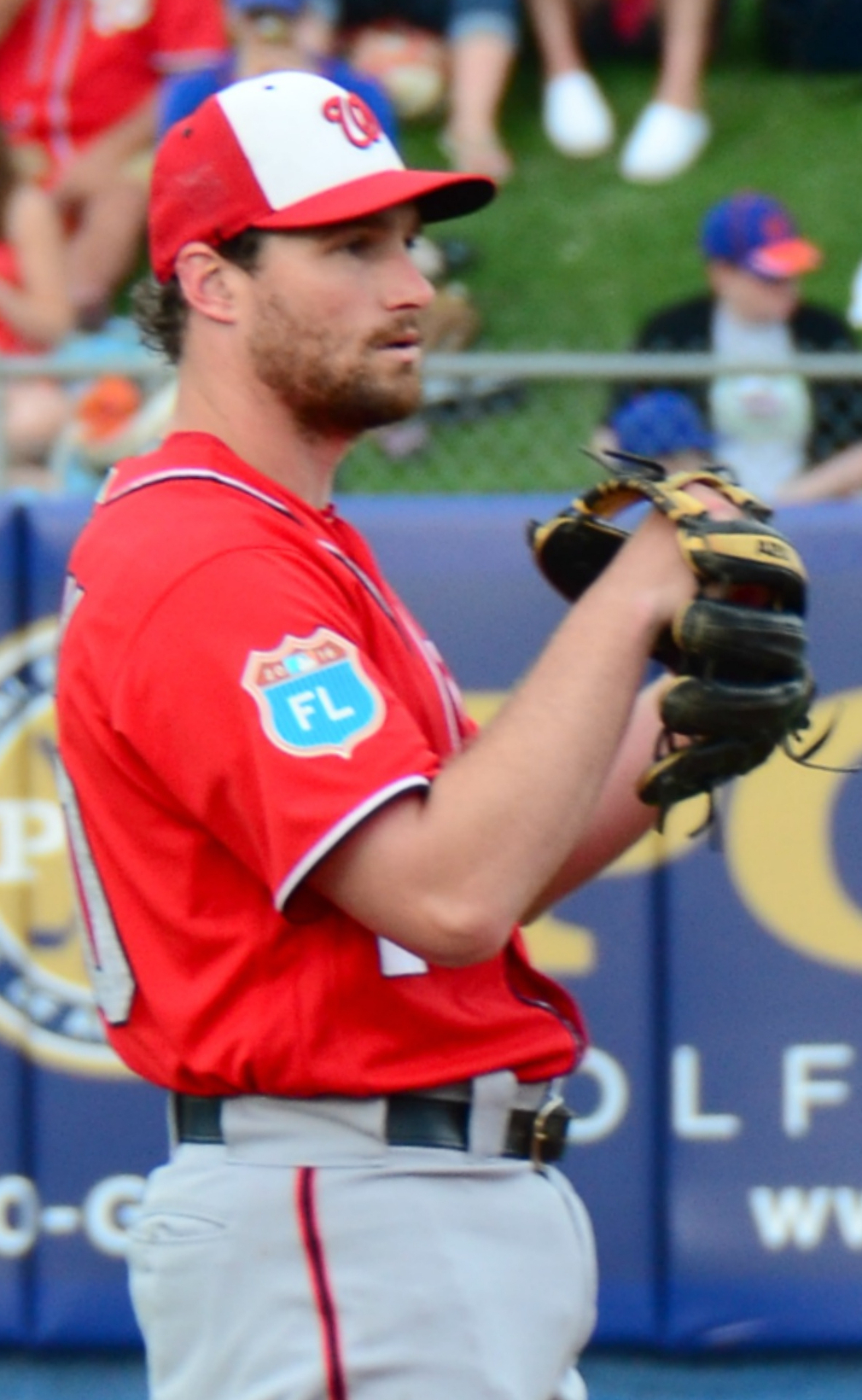 Daniel Murphy